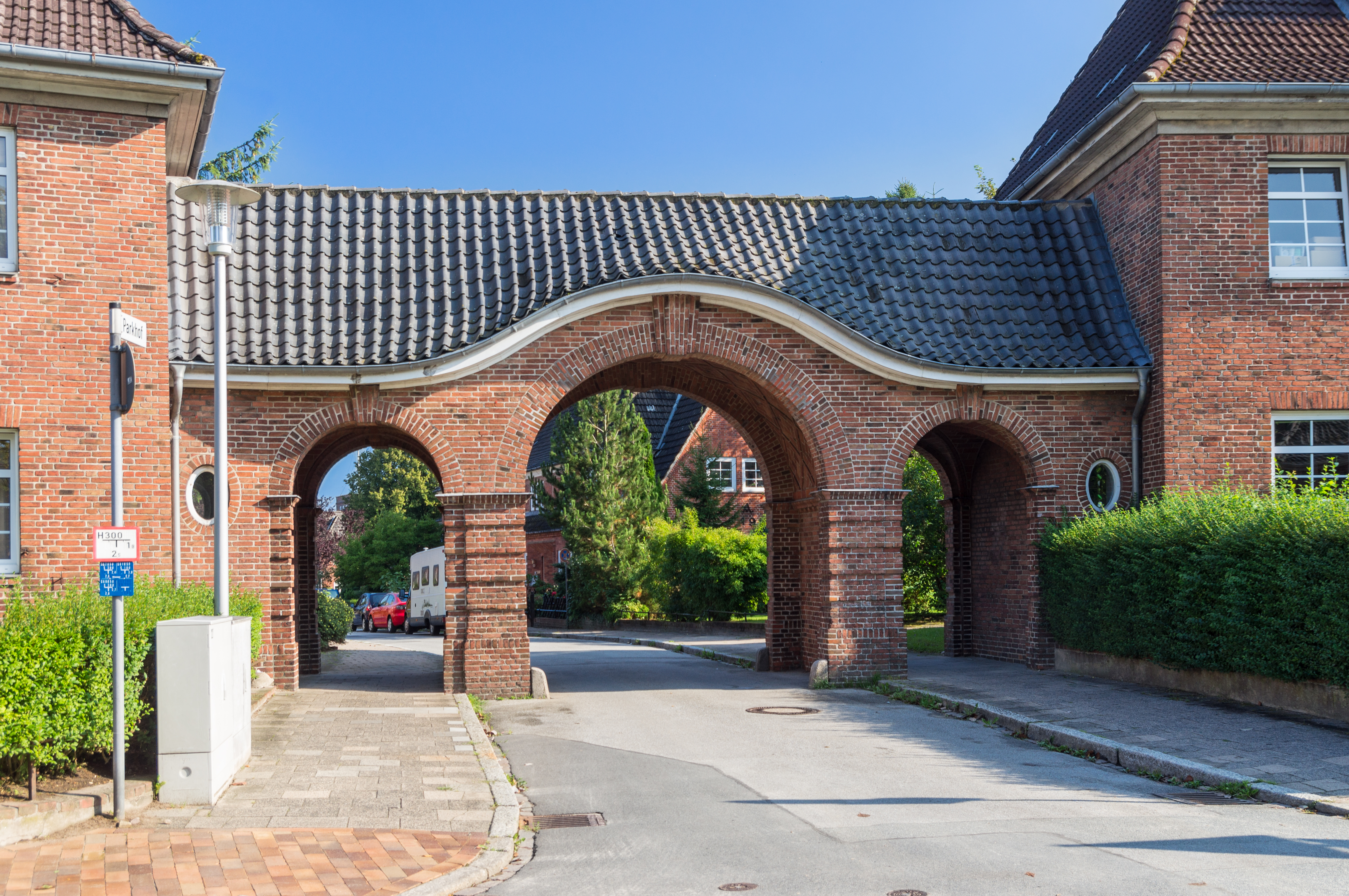 Flensburg-Mürwik, Swinemuender Strasse, Torbogen, Denkmal-Nr. 26. Hinter dem Torbogen liegt die ehem. Marinesiedlung Parkhof.